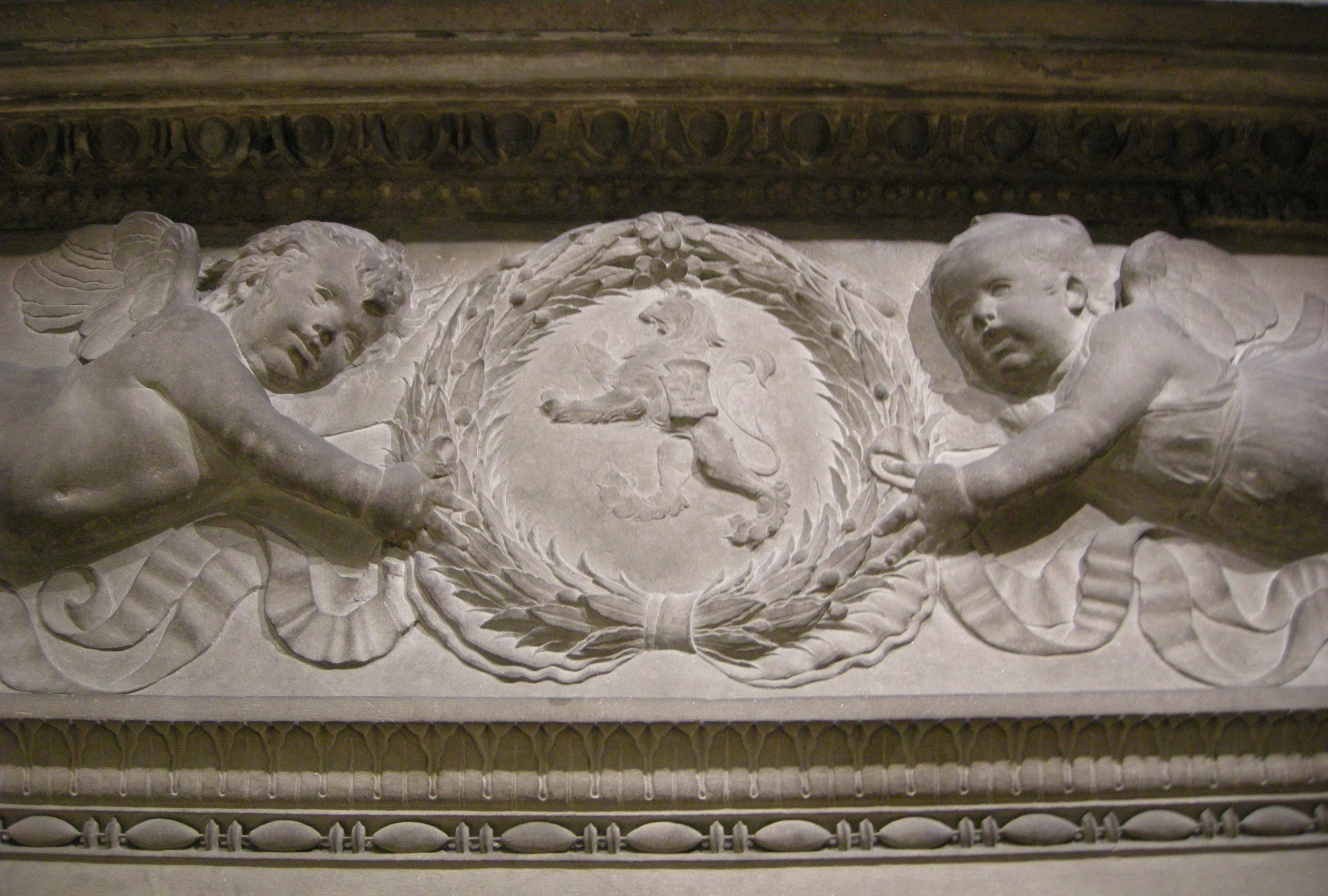 Desiderio da settignano, camino, 1455-58 stemma boni